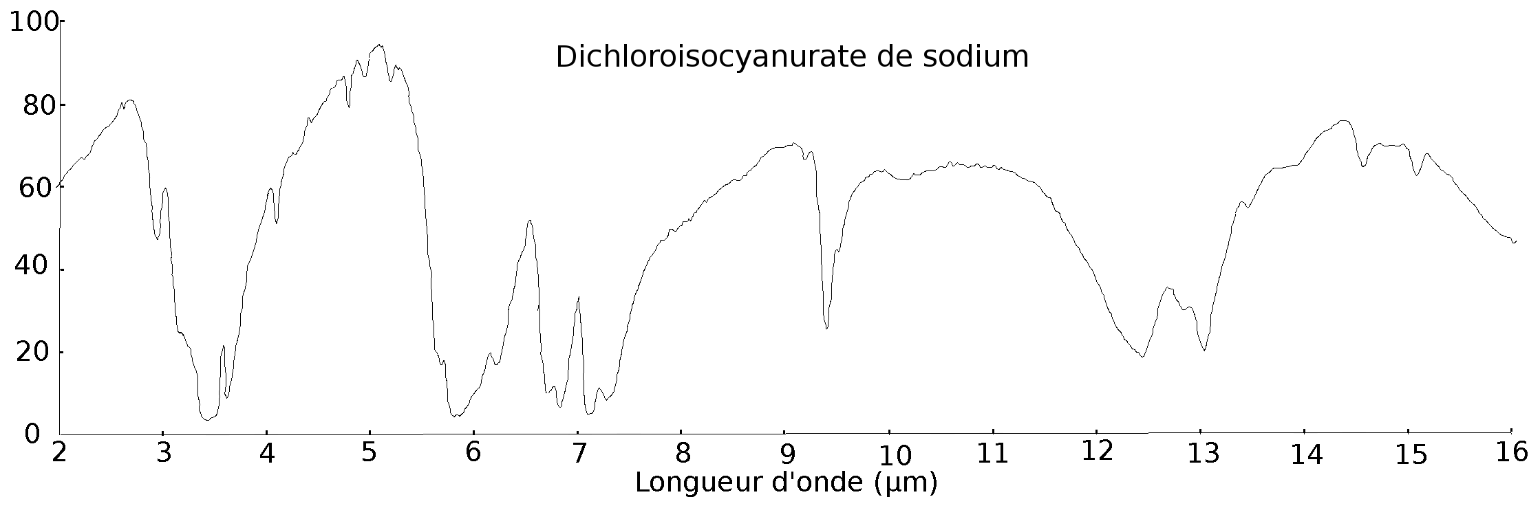 Spectre infrarouge du dichloroisocyanurate de sodium d'après NIST